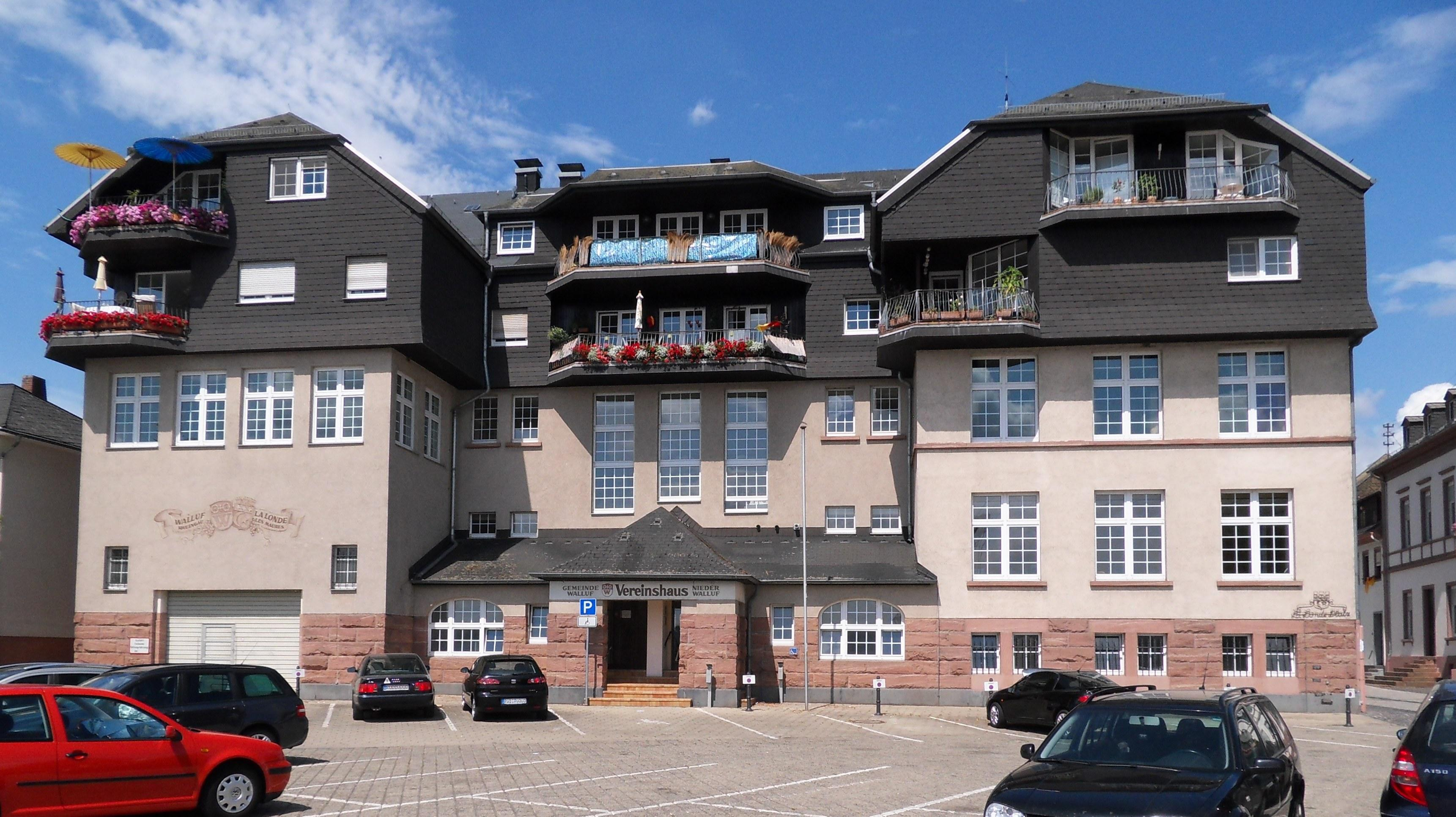 Das stattliche, zum Vereinshaus umgebaute alte Rathaus von Niederwalluf am La-Londe-Platz am Rheinufer